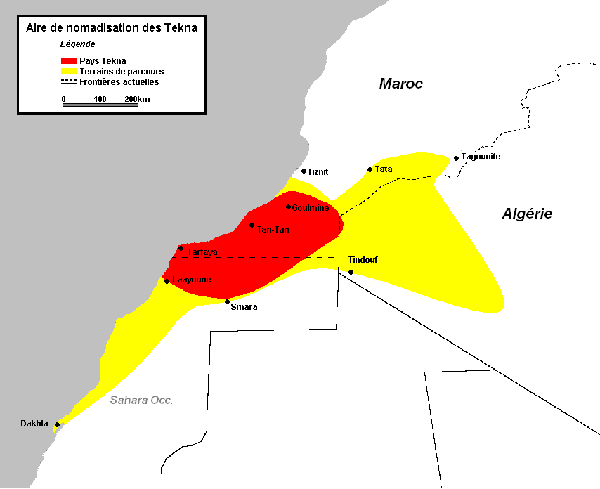 Aire approximative de nomadisation des Tekna Sources: Attilo Gaudio, "Les populations du Sahara occidental: histoire, vie et culture", ed. Karthala 1993, (Chap. VIII, pp.97-116) (ISBN: 2-86537-411-4) [1]Maurice Barbier, "Le conflit du Sahara occidental", ed. L'Harmattan 2000 (ISBN: 285802197X) [2]